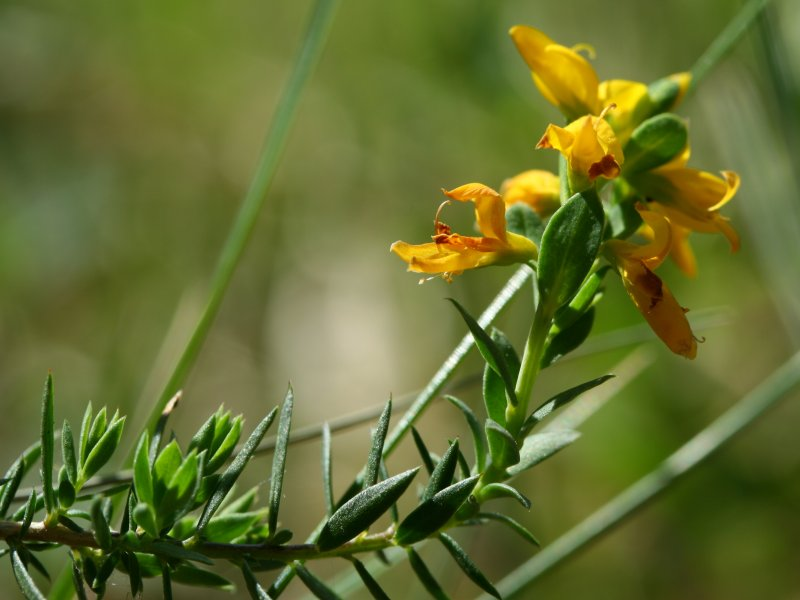 Englischer Ginster (Genista anglica subsp. anglica)